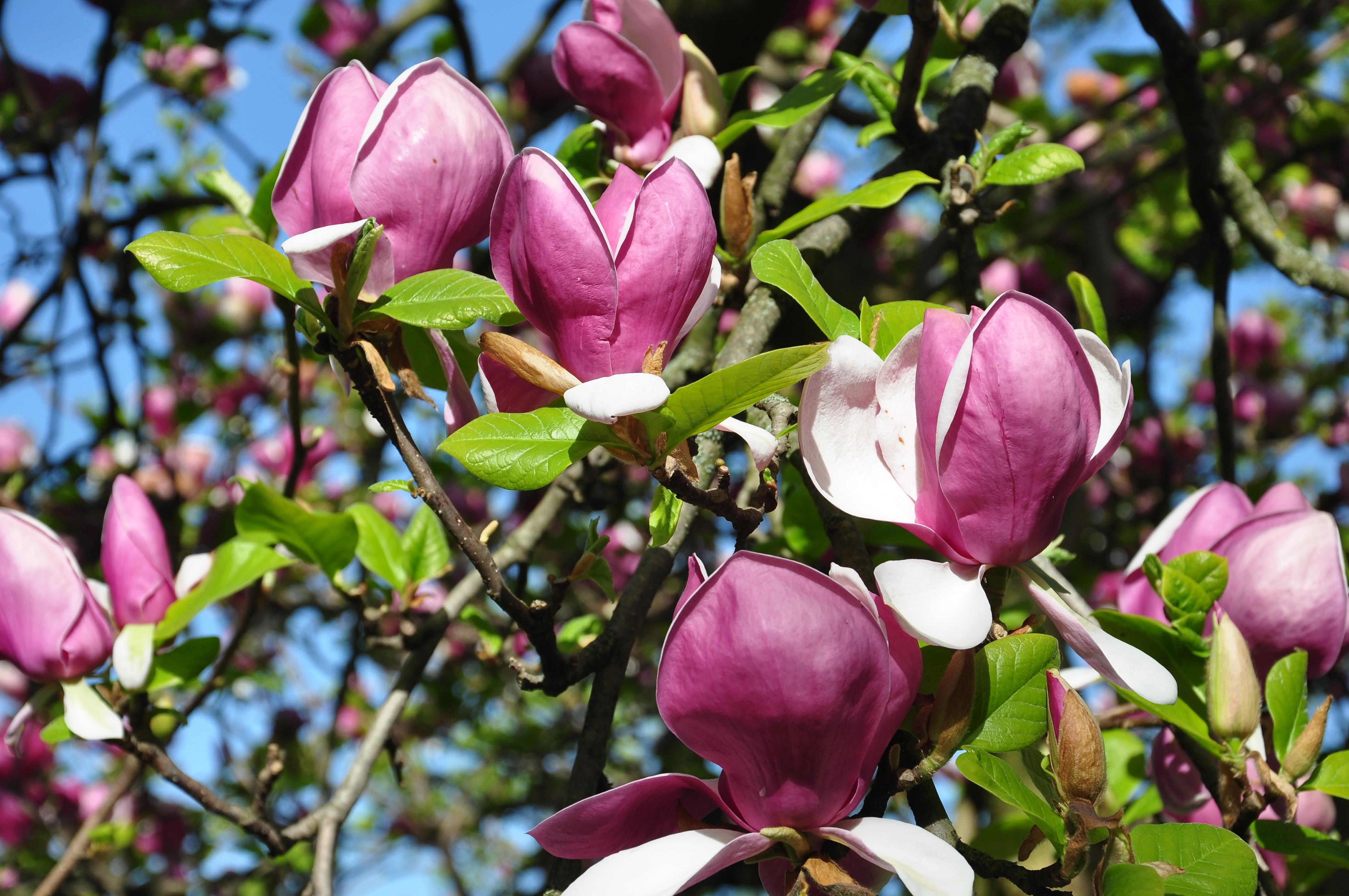 Magnolia × soulangeana 'Lennei' in Arboretum in Zürich-Enge (Switzerland)